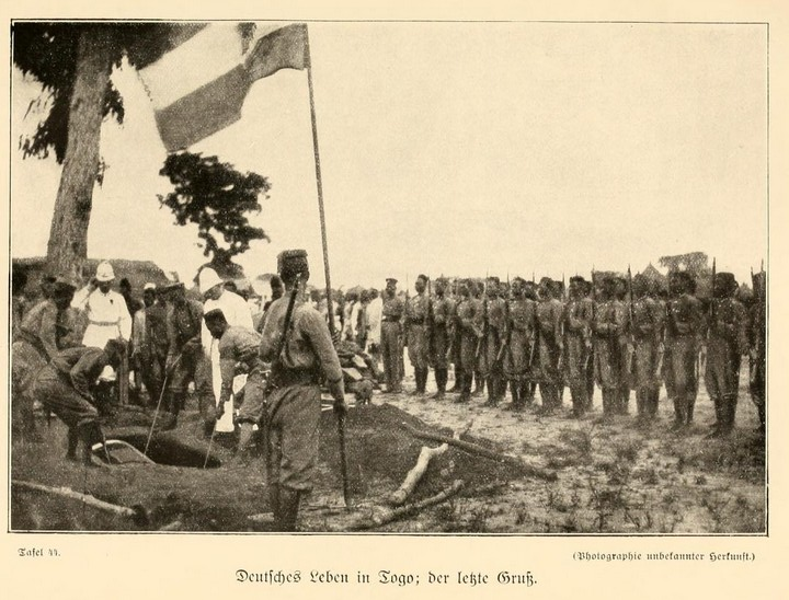 “Togo, eine Beerdigungsfeier mit militärischen Ehren” - from Expeditionsbericht der Zweiten Deutschen Inner-Afrika-Expedition (1907-09) Auf dem wege nach Atlantis.